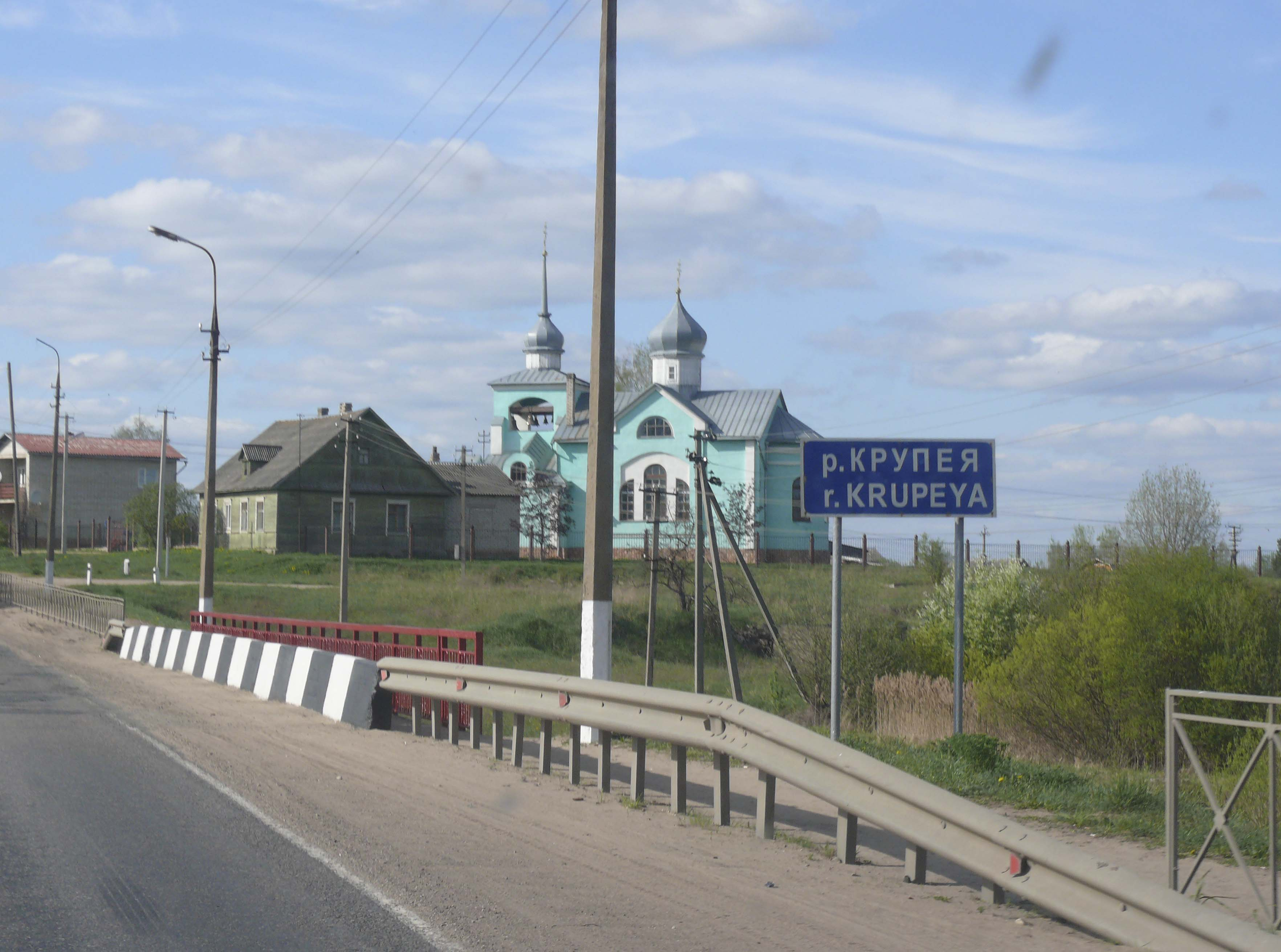 Мост через Крупею в Пустошке, Псковская область